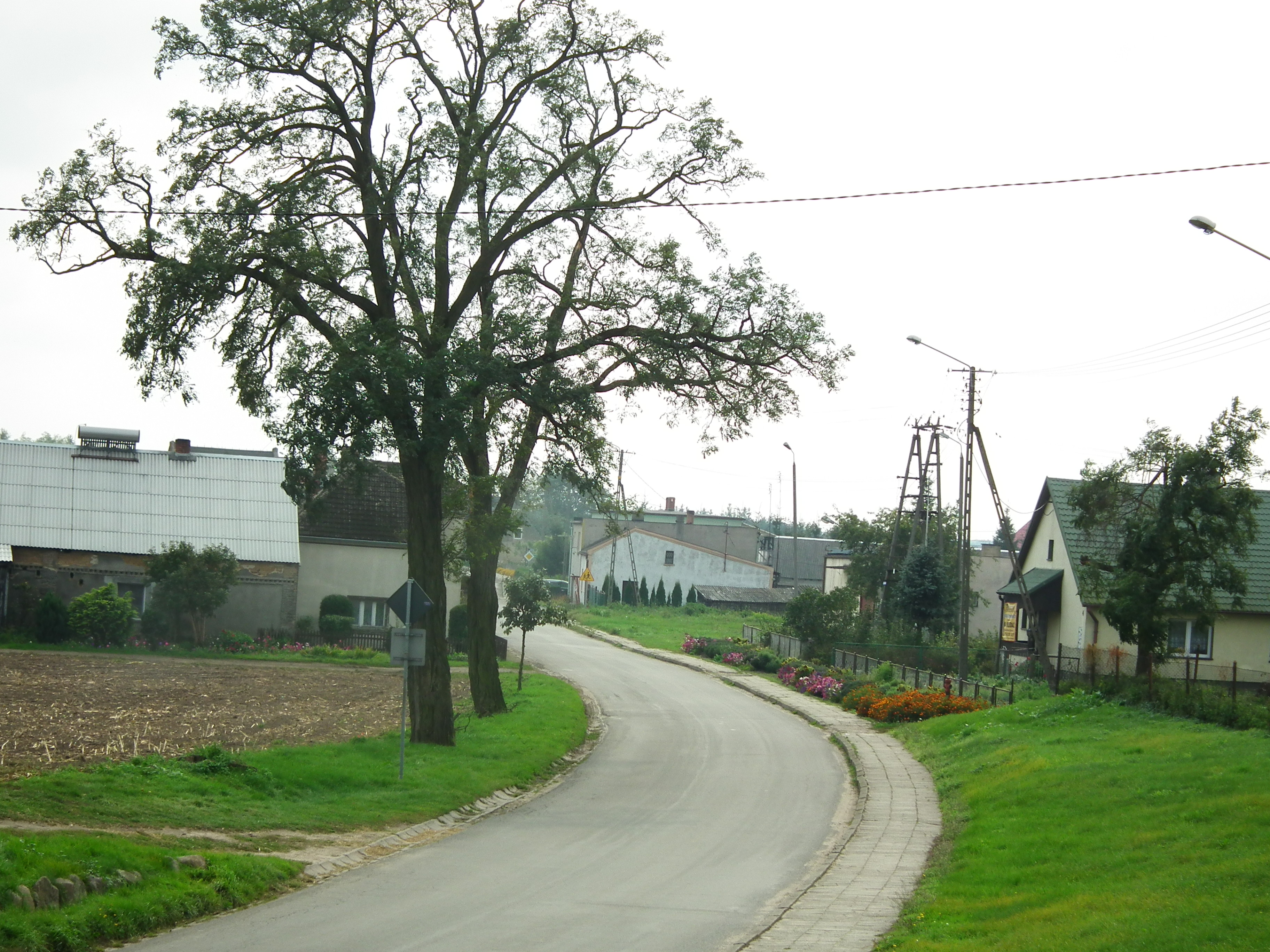 Gościeszyn - powiat żniński.